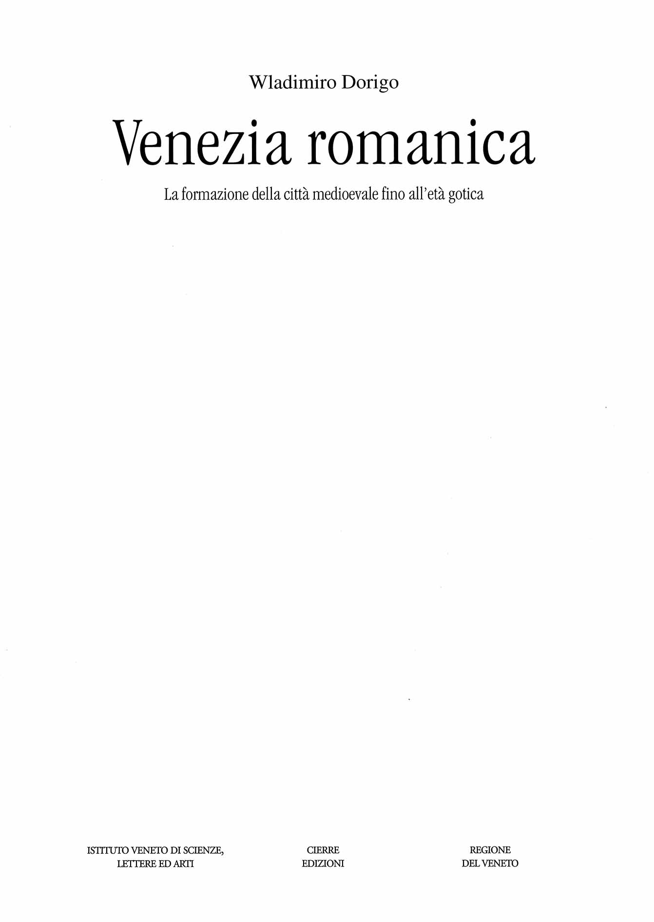 Venezia romanica : la formazione della città medioevale fino all'età gotica / Wladimiro Dorigo. - Venezia : Istituto veneto di scienze lettere ed arti, 2003 .